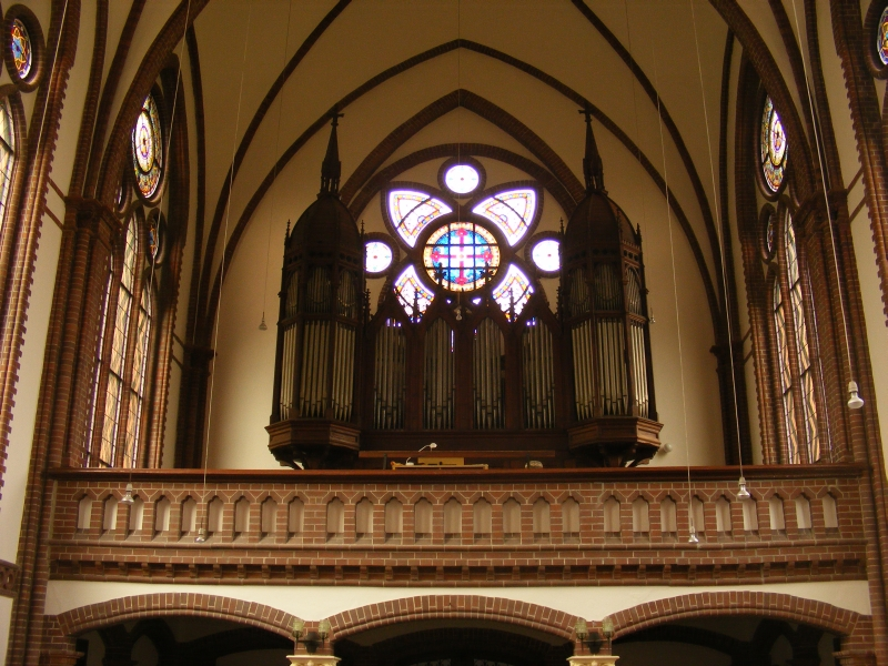 Empore/Orgel